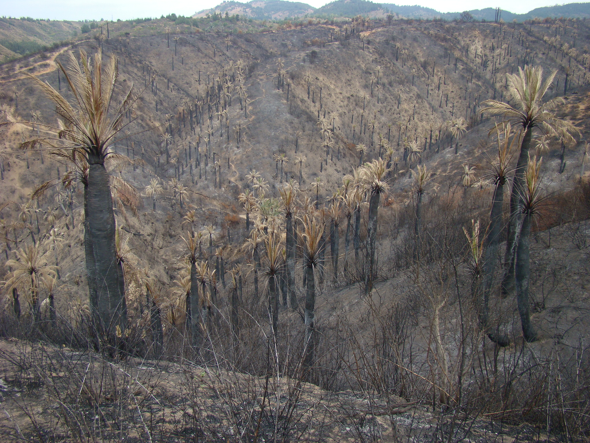 Incendio Palmar El Salto, Viña del Mar, febrero 2012